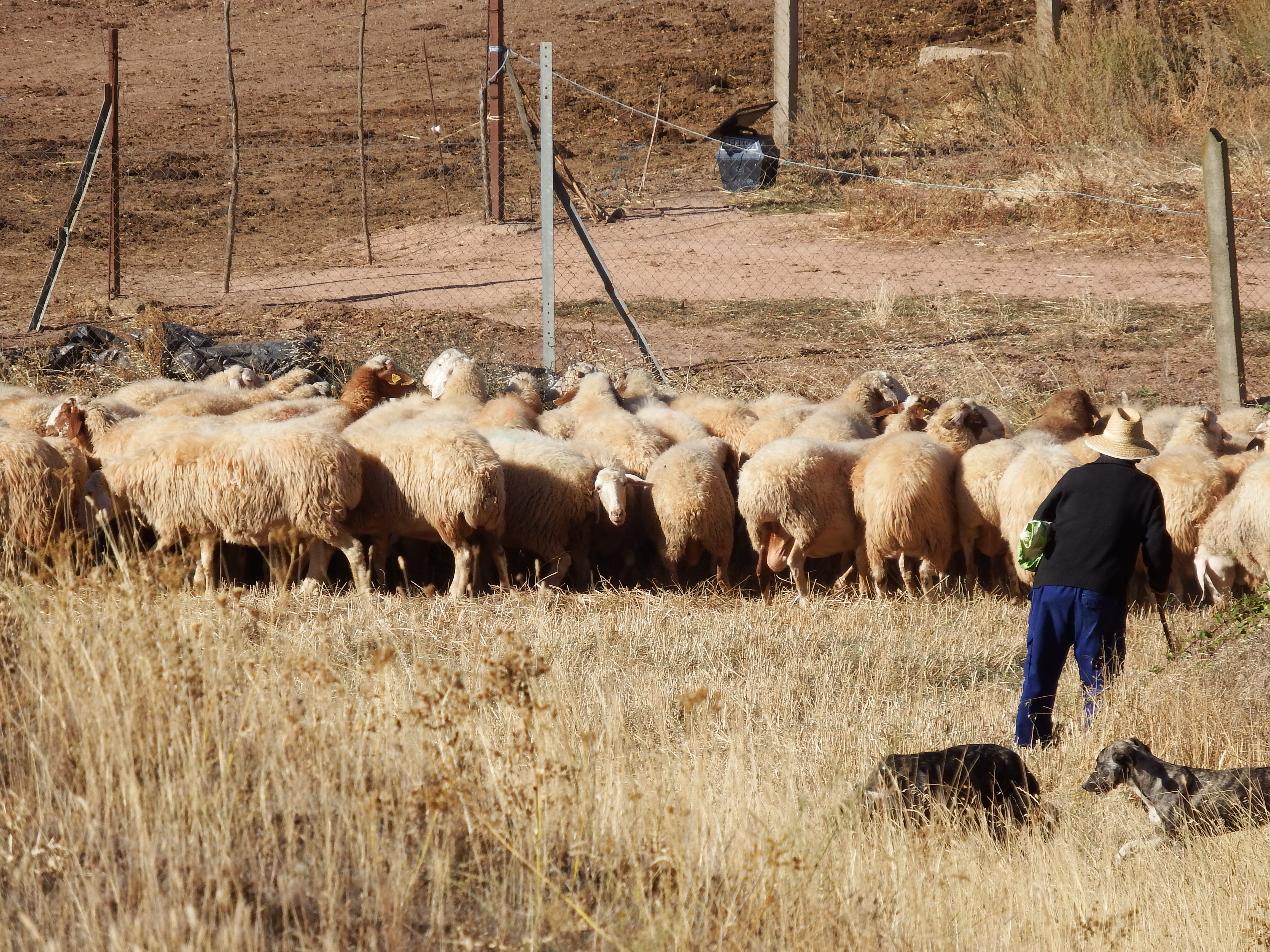 Andavías